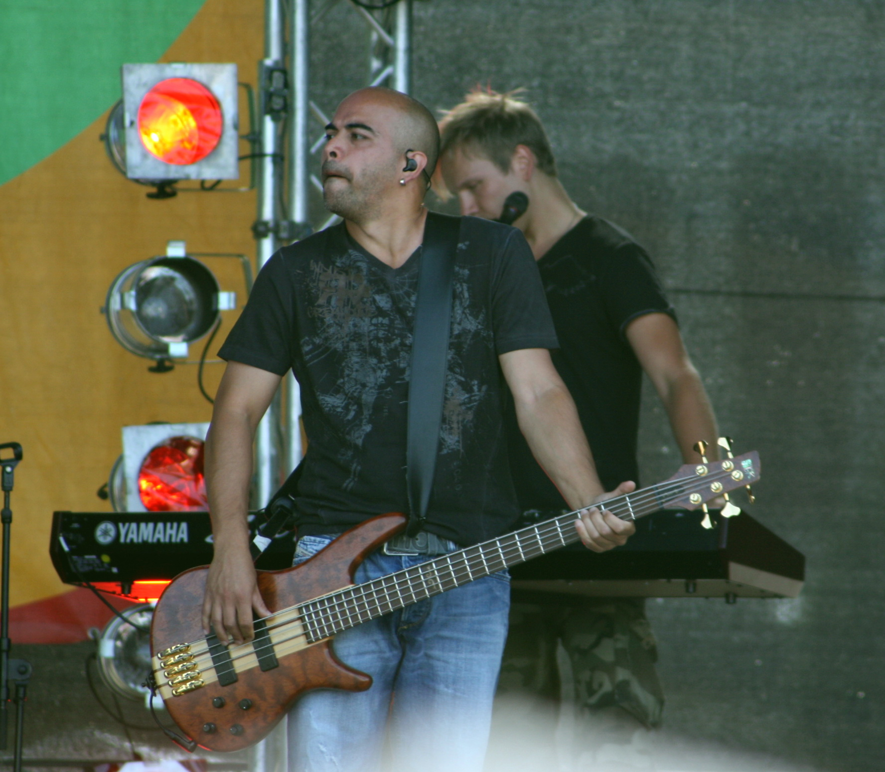 Sunrise Avenue - im Vordergrund Raul, im Hintergrund Osmo Ikonen.